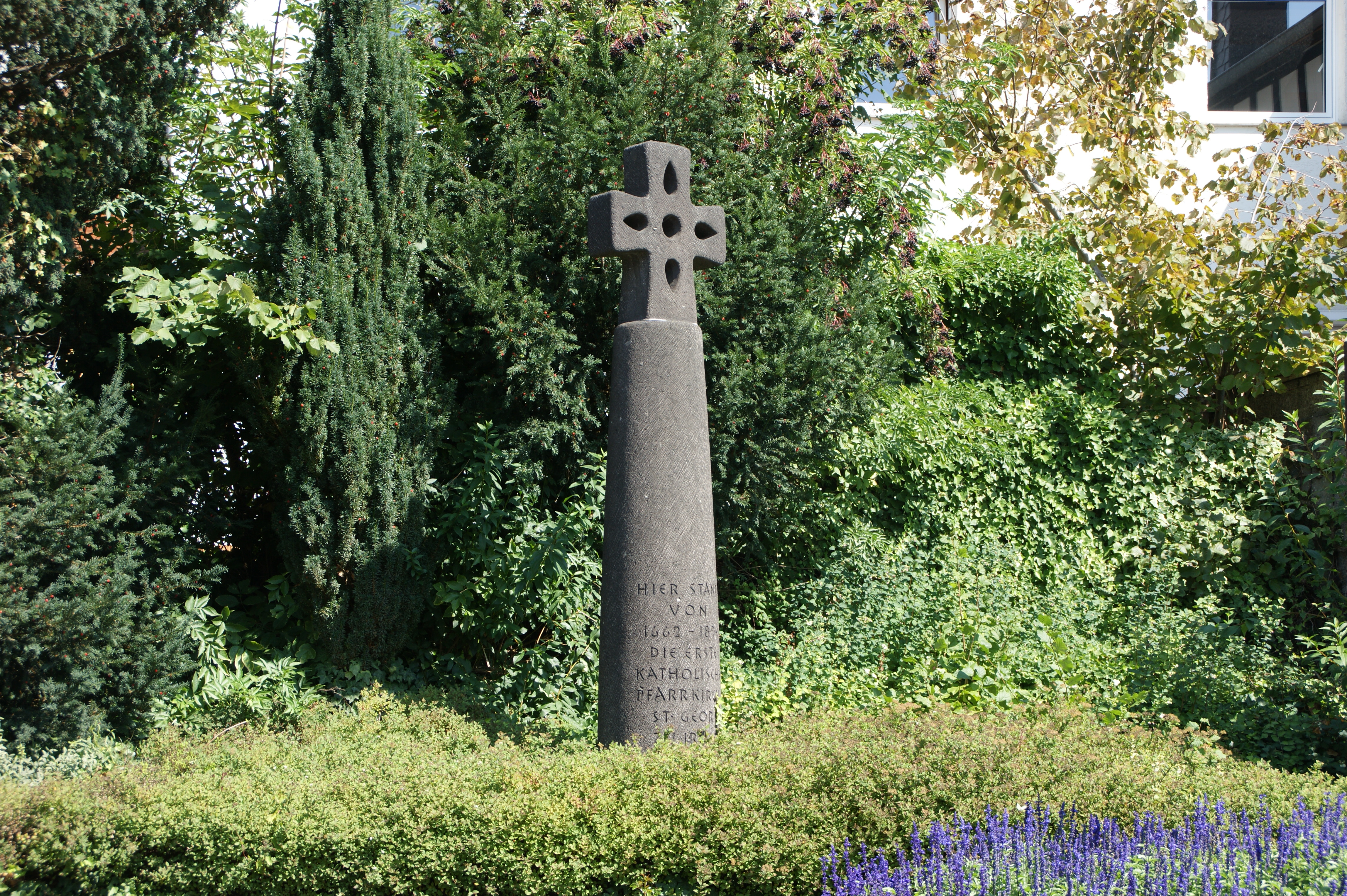 Gedenkkreuz für die abgebrochene Pfarrkirche St. Georg in Irlich